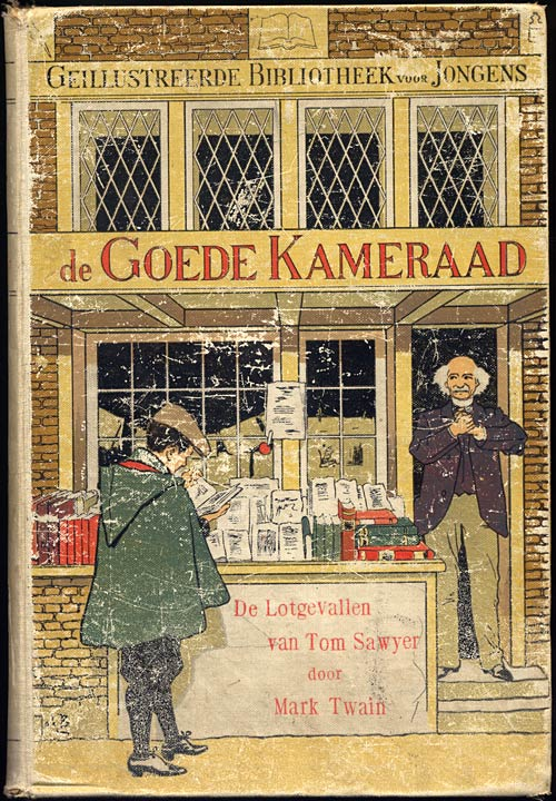 Mark Twain's De Lotgevallen van Tom Sawyer, Nederlandse Vertaling 1920